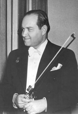 Title: Dresden, Konzert David Oistrach People in the image: David Oistrach Factual corrections and alternative descriptions are encouraged separately from the original description. Additionally errors can be reported at this page to inform the Bundesarchiv. Original historic description: Zentralbild-Braun Str-Sta. 15.2.1954 David Oistrach spielt in Dresden Der berühmte sowjetische Geigenvirtuose, Stalinpreisträger und Verdienter Künstler David Oistrach gab am 12.2.1954 im Hygiene-Museum in Dresden ein Konzert mit der Staatskapelle Dresden unter Leitung von Nationalpreisträger Franz Konwitschny. UBz: David Oistrach (rechts) und Generalmusikdirektor Franz Konwitschny.